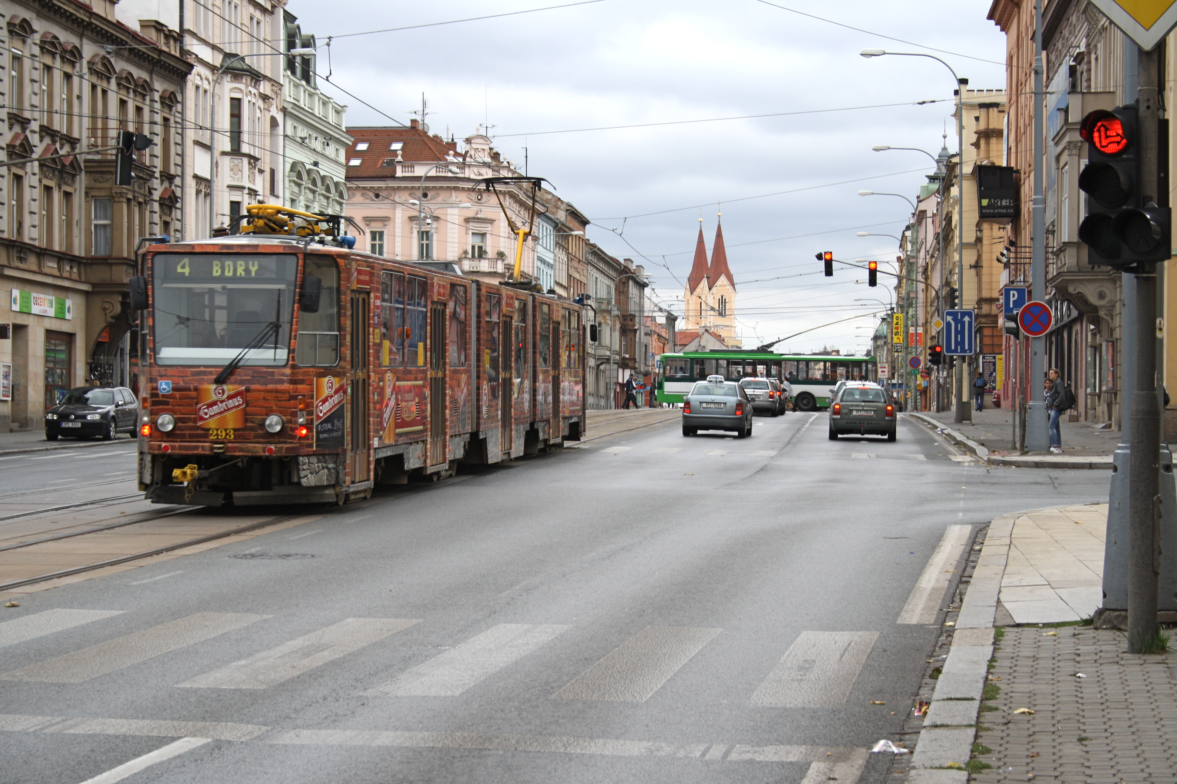 Tram und O-Bus Pilsen